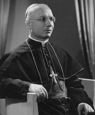 Gennaro Verolino en 1951.